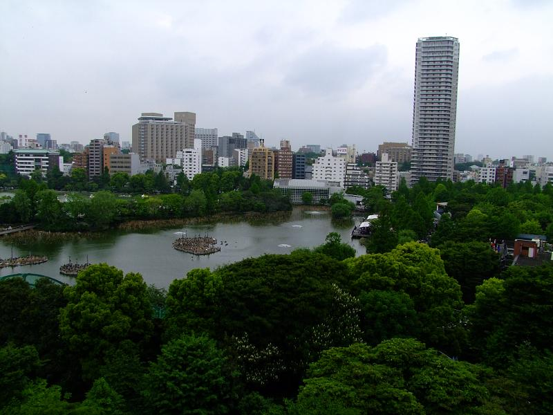 Shinobazu pond,Ueno,Tokyo,Japan